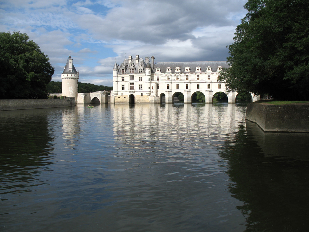 Château de Chenonceau, France